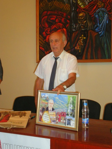 Славко Григоров, български писател и краевед